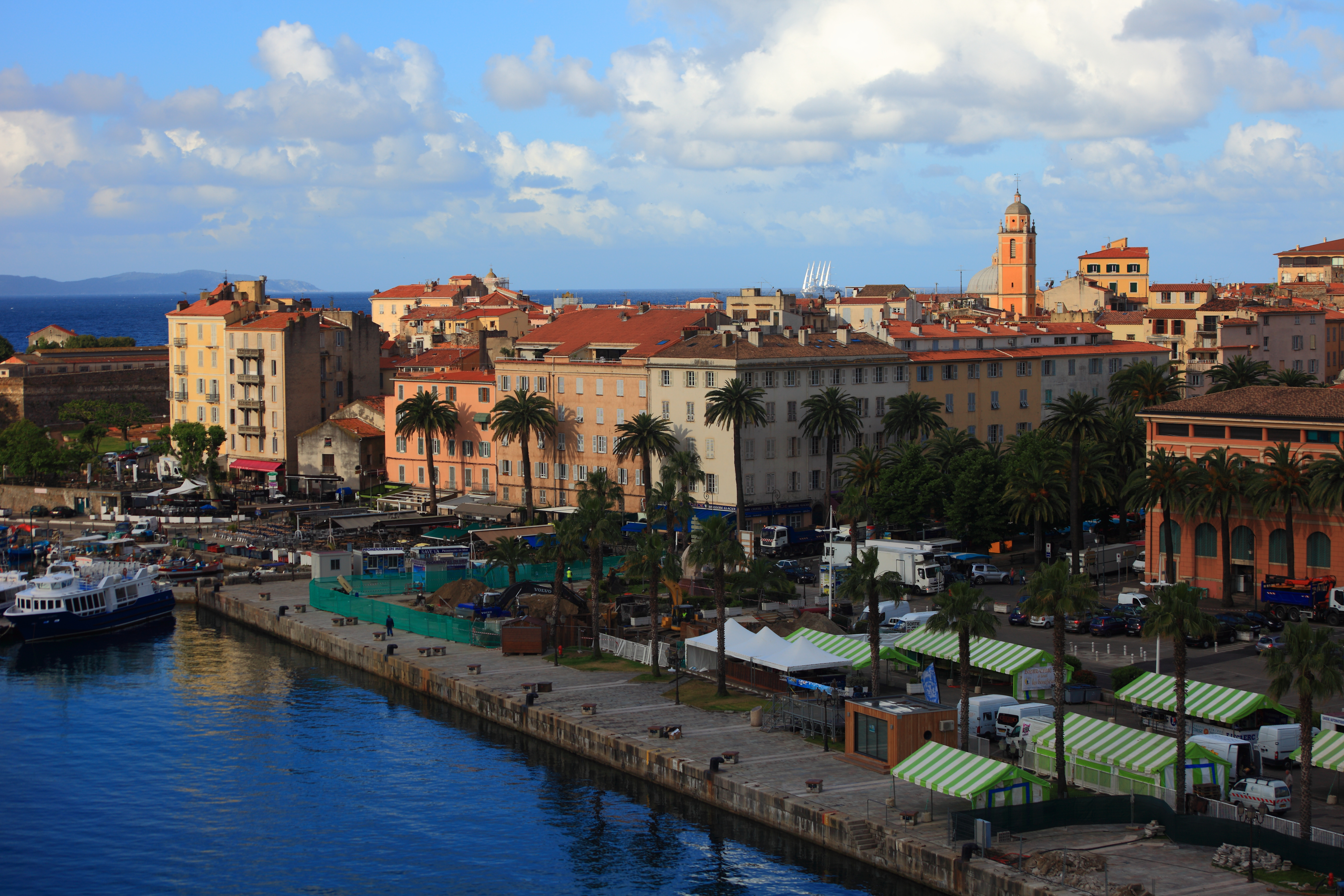 Vue du centre-ville d'Ajaccio